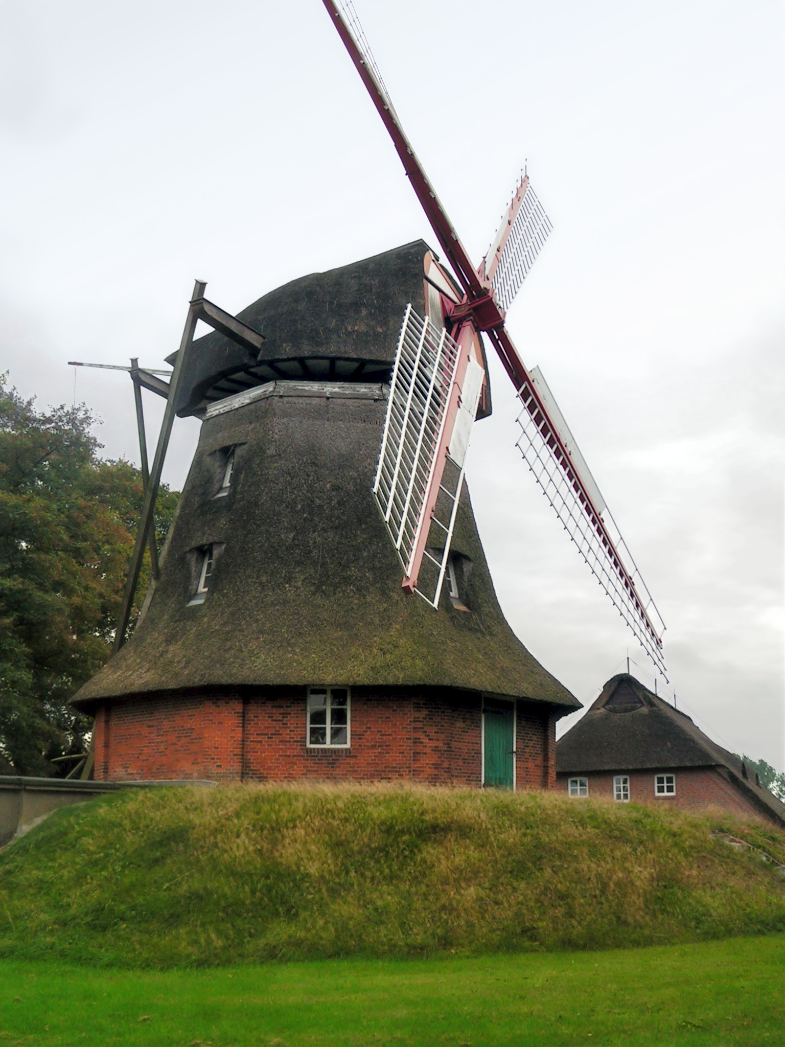 Windmühle Bremen-Rekum. Das abgebildete Objekt ist ein geschütztes Kulturdenkmal in der Freien Hansestadt Bremen, mit der Nr. 1269 beim Landesamt für Denkmalpflege registriert.